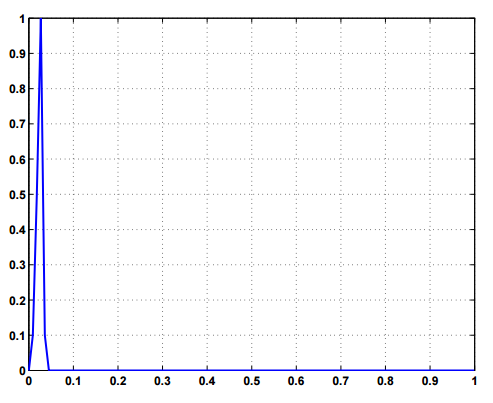 Plot função de força transitória